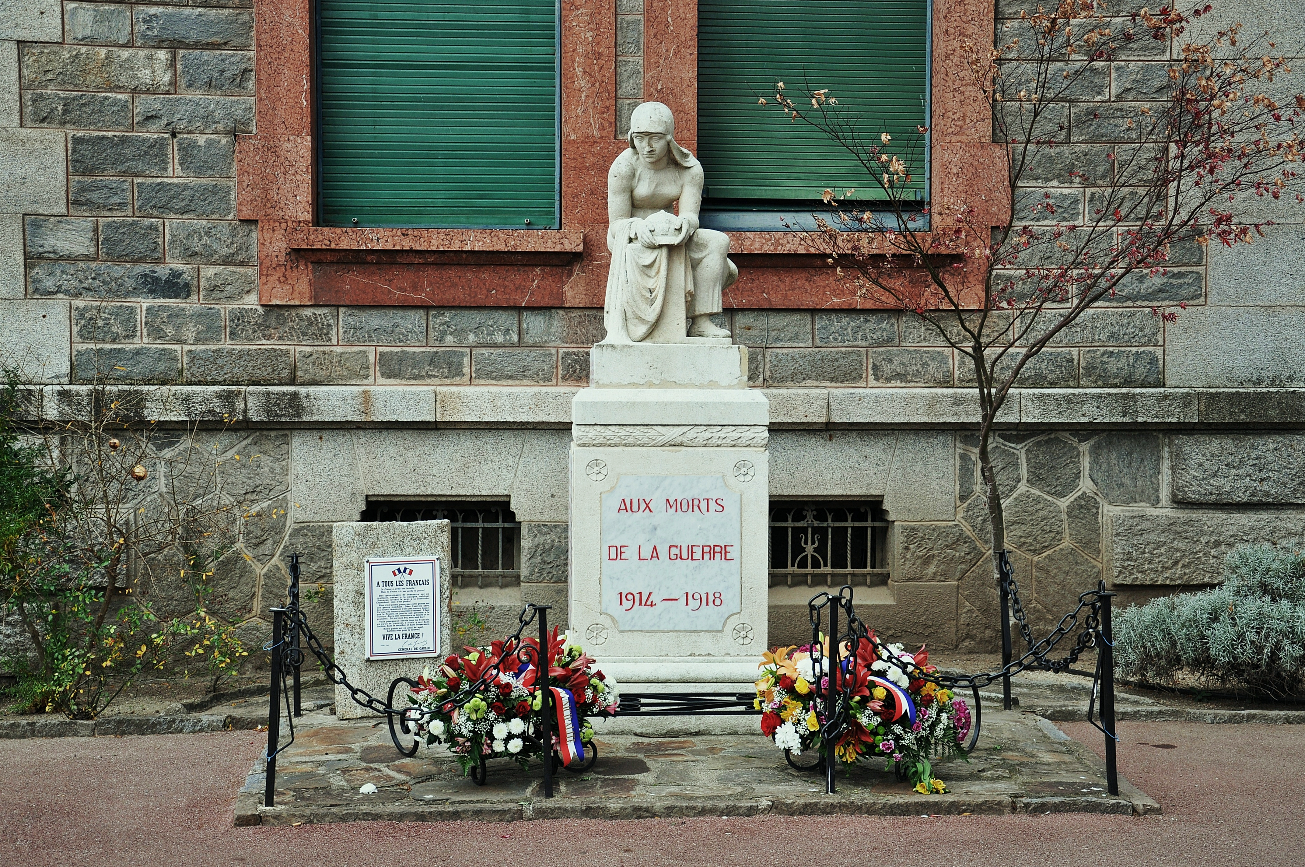 cataluña norte